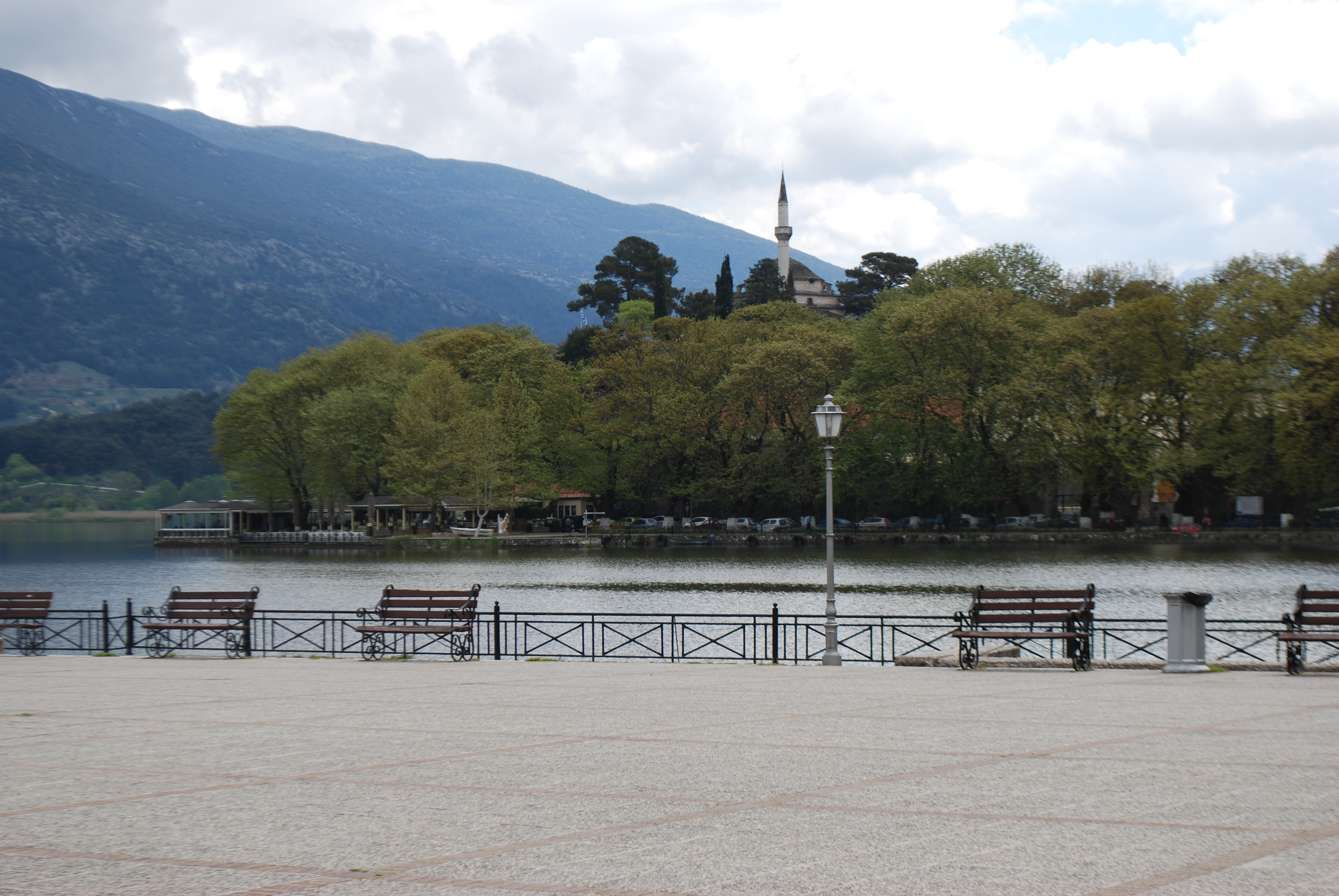 Vue de Ioannina.